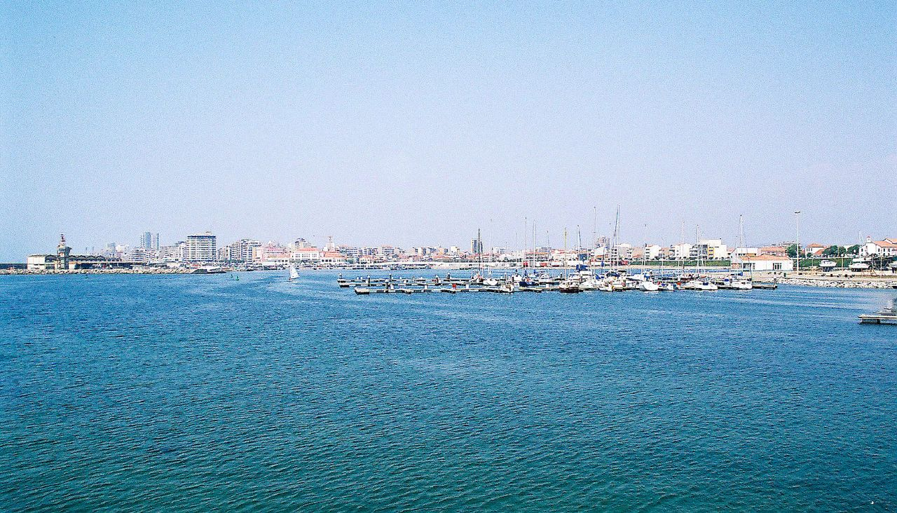 Porto da Póvoa de Varzim - Portugal